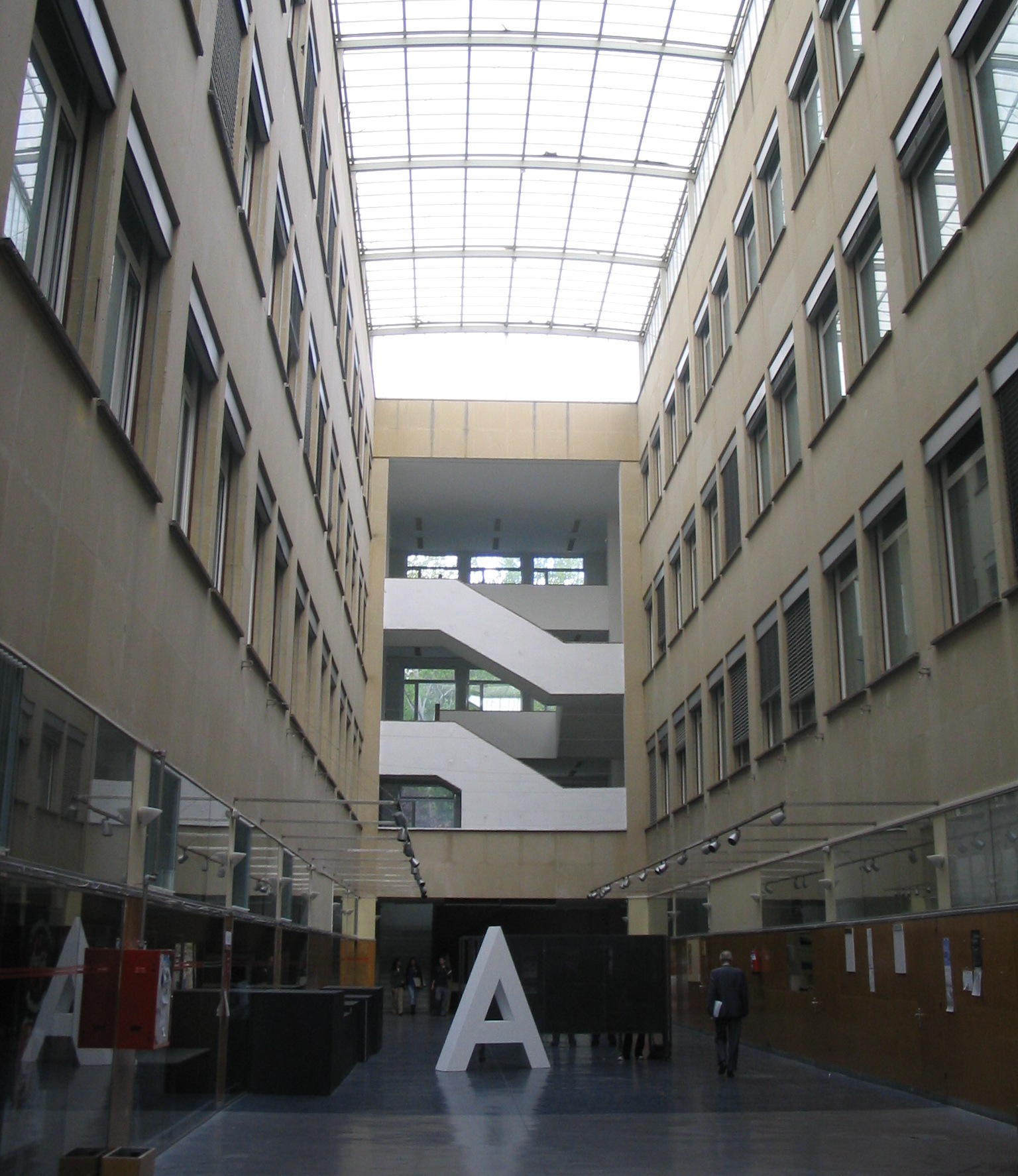 Espacio diáfano del interior del Edificio nuevo de la Escuela Técnica Superior de Arquitectura de Madrid, España.